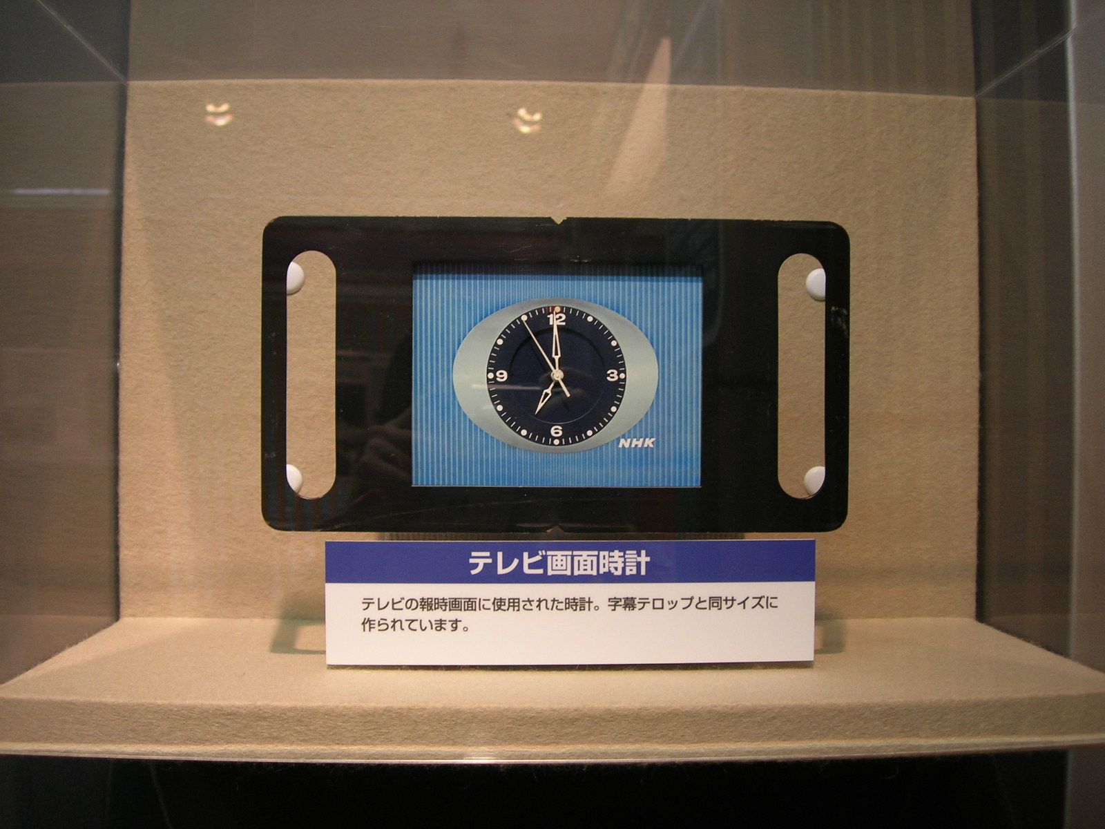 NHK放送博物館、テレビの報時画面に使用された時計。字幕テロップと同サイズに作られています。